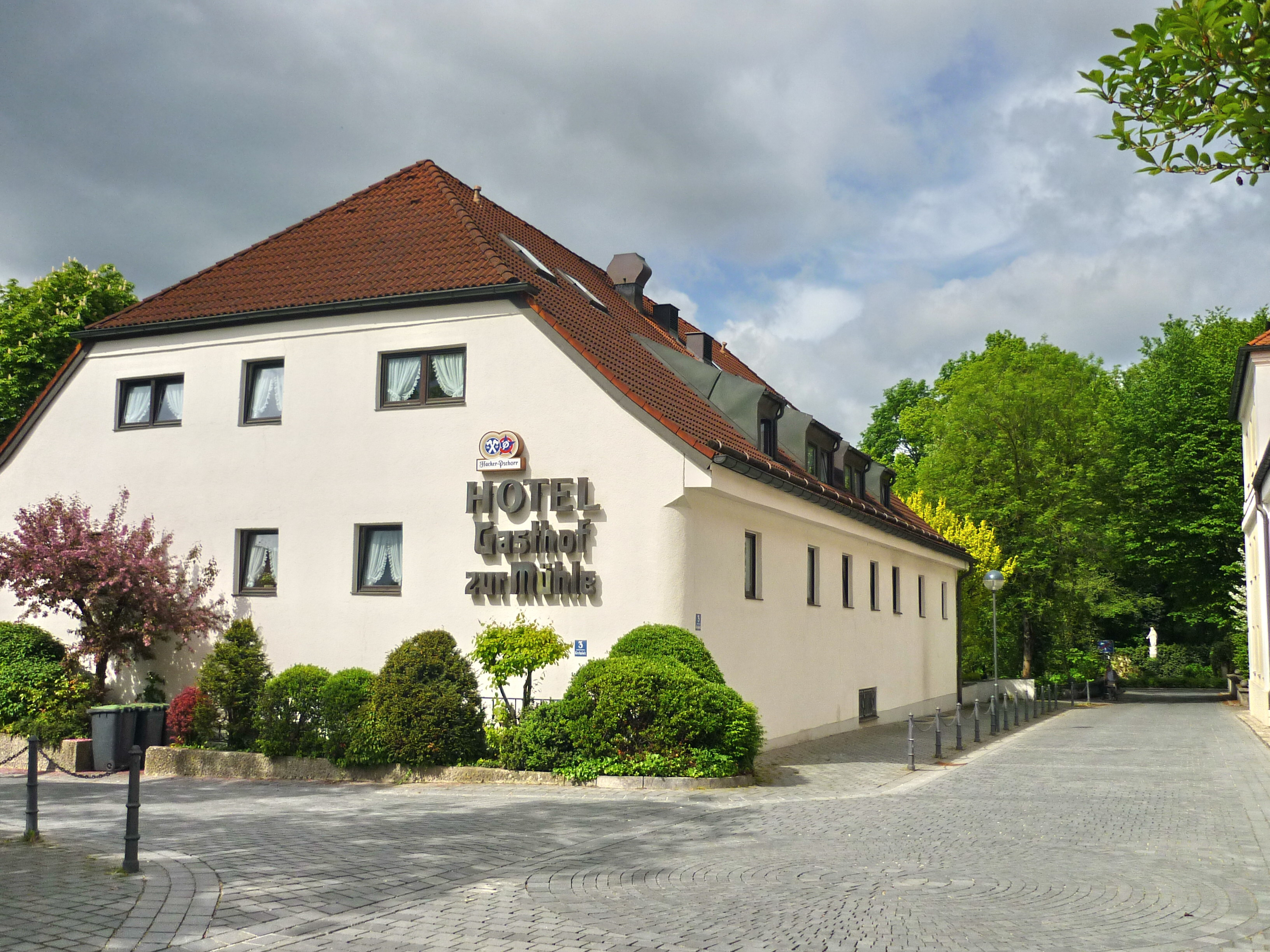 Ismaning, Hotel und Gasthof zur Mühle, Kirchplatz 3